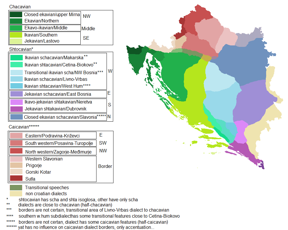 Hrvatski dijalekti u 14. stoljeću, izvor su slike iz grupacije hr. jezikoslovlje poput